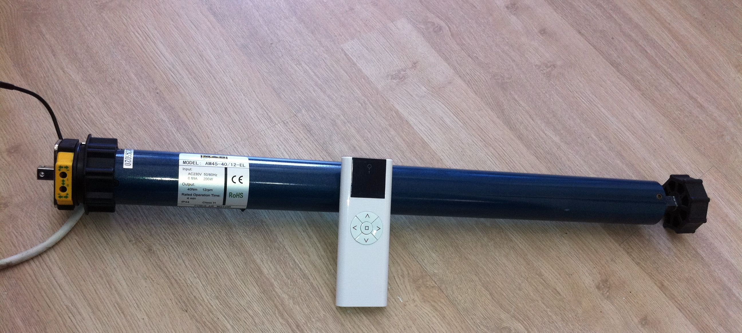 Imagen motor tubular para persiana M&B Premium con mando a distancia